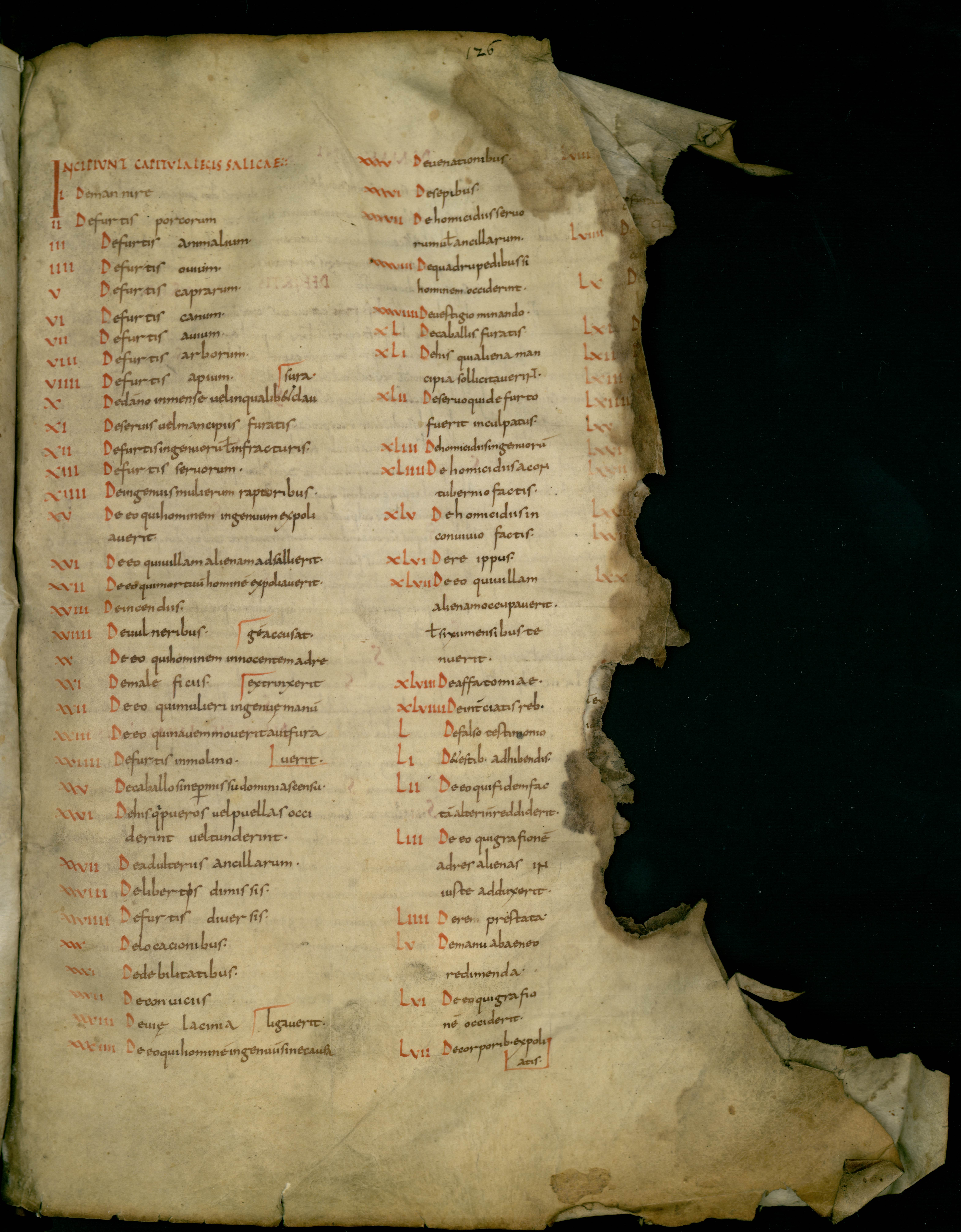 Lex Salica